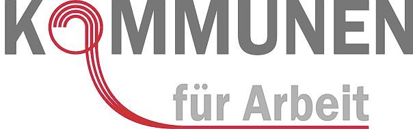 Logo der Kommunen für Arbeit